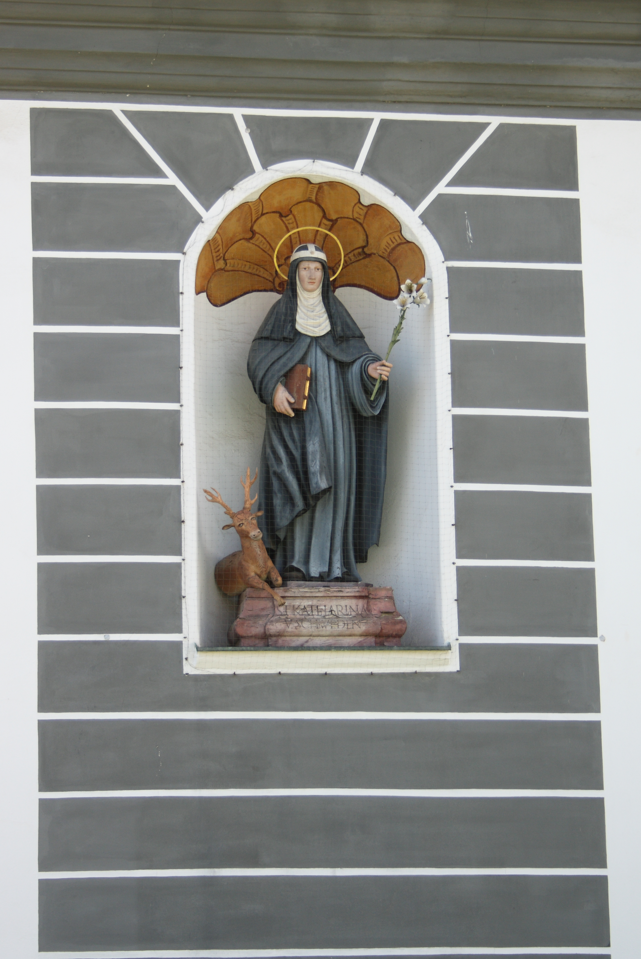 Kloster Altomünster im Landkreis Dachau (Bayern), Skulptur der hl. Katharina von Schweden